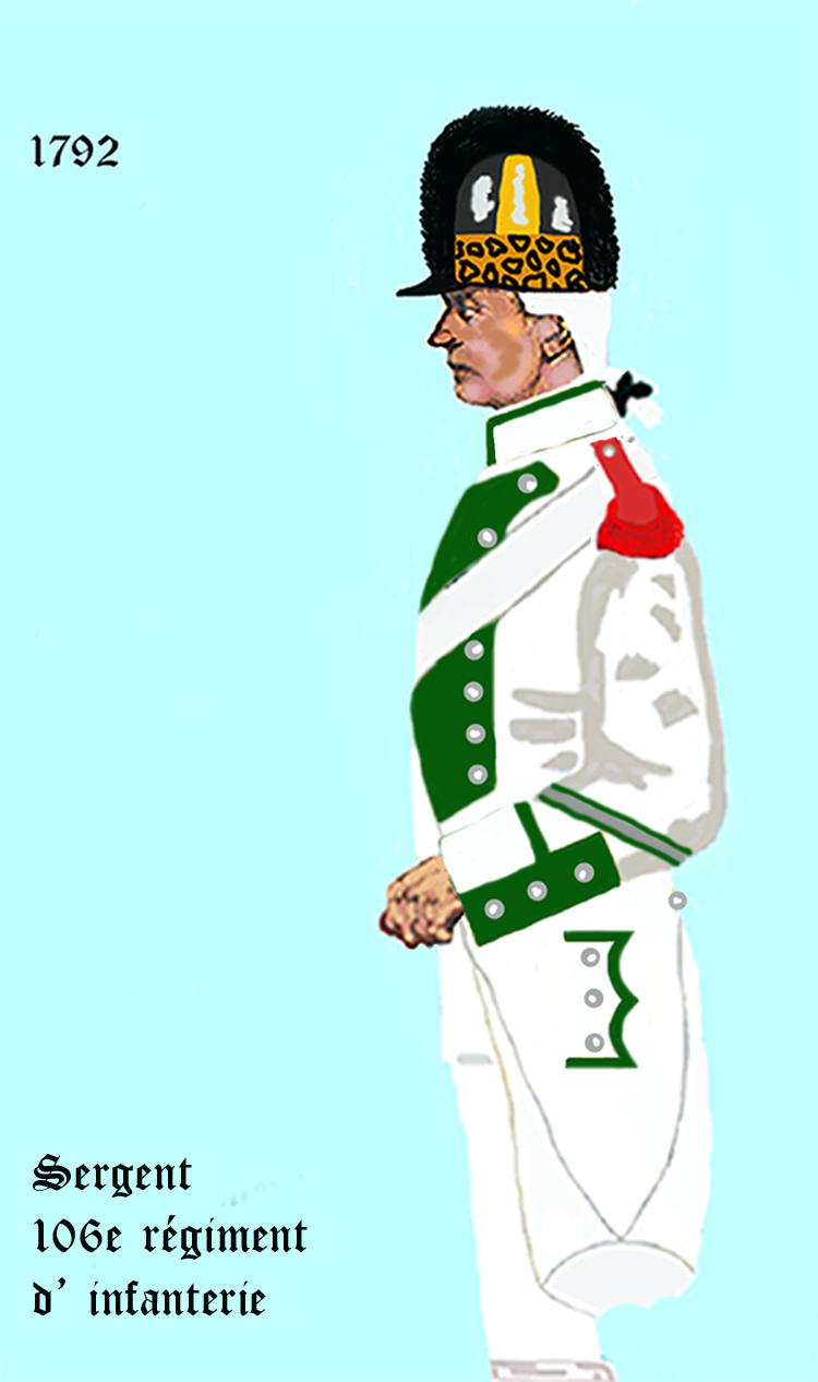 Uniform eines königlich französischen Infanterie-Regiments gemäß Dekret von 1792. - Entnommen und überarbeitet aus: „LES UNIFORMES ET LES DRAPEAUX DE L'ARMÉE DU ROI“ Marseille 1899.